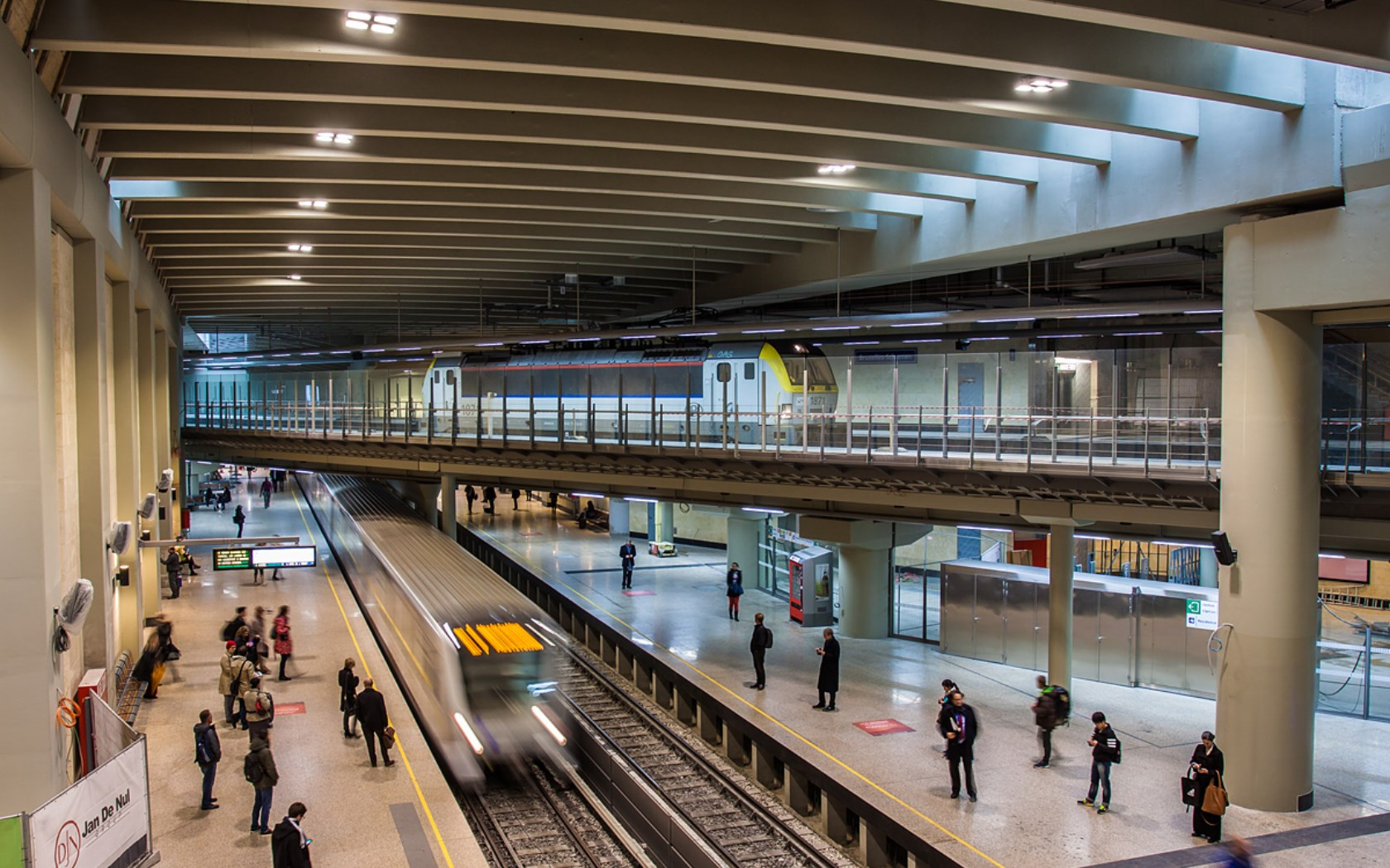 Gare de Bruxelles-Schuman (chemin de fer et metro)